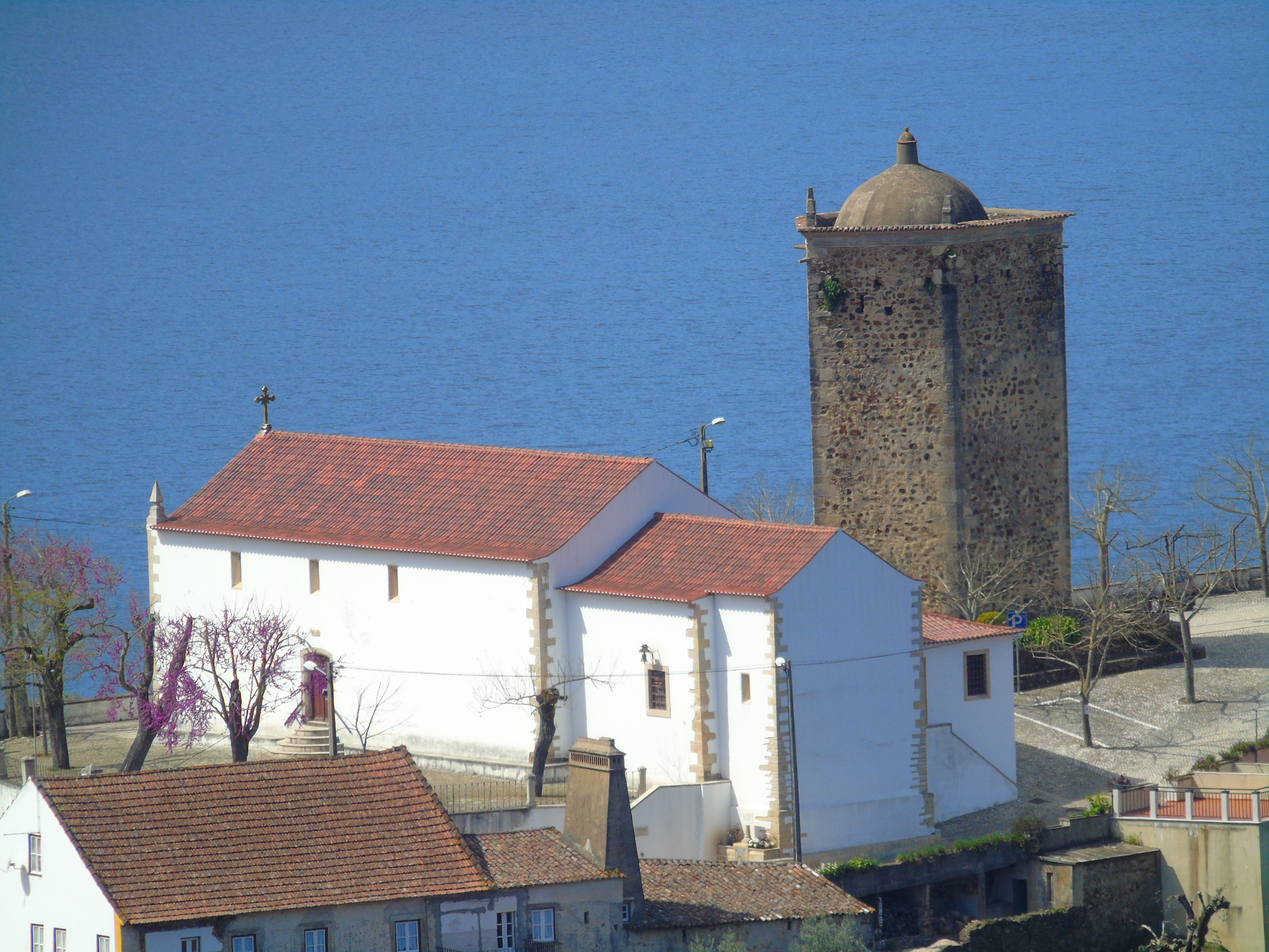 Torre de Dornes e Capela de Nossa Senhora do Pranto